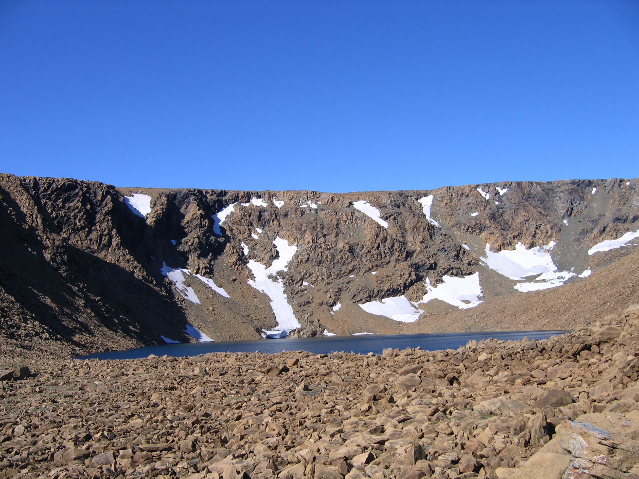 Полярный Урал, горное озеро, август 2006.